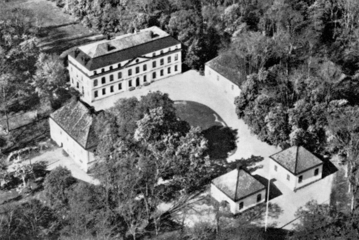 Bergshammar med flygelbyggnader